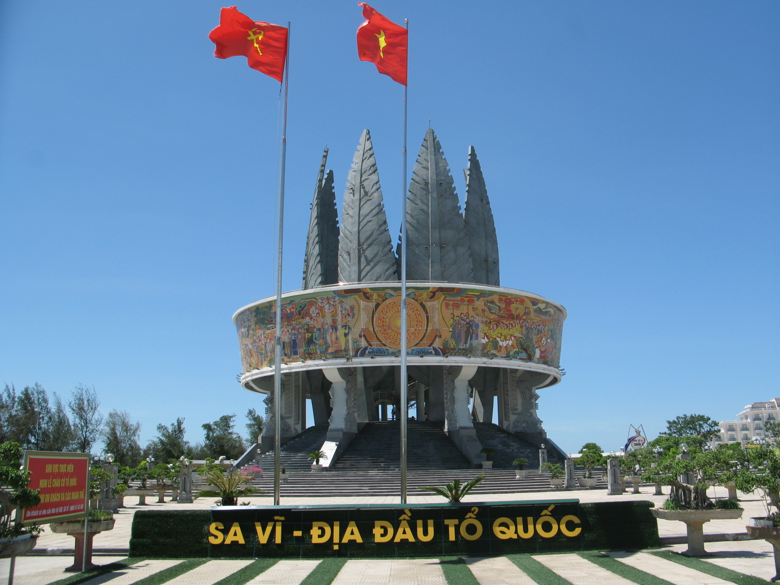 Cụm Thông tin cổ động biên giới Sa Vĩ, phần cụm công trình chính - Mũi Sa Vĩ - phường Trà Cổ - thành phố Móng Cái - Quảng Ninh